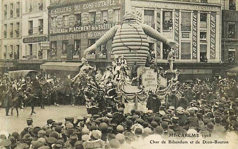 Le char de Bibendum et De Dion-Bouton à la Mi-Carême 1908 à Paris.